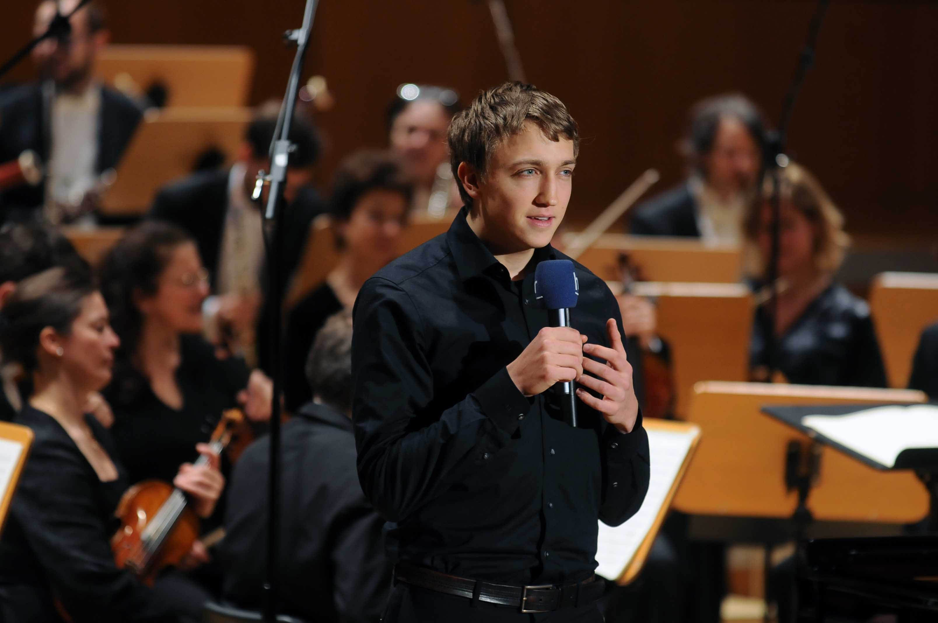 Fabian Müller 2015 im Sendesaal des hessischen Rundfunk (Foto: Anna Meuer)